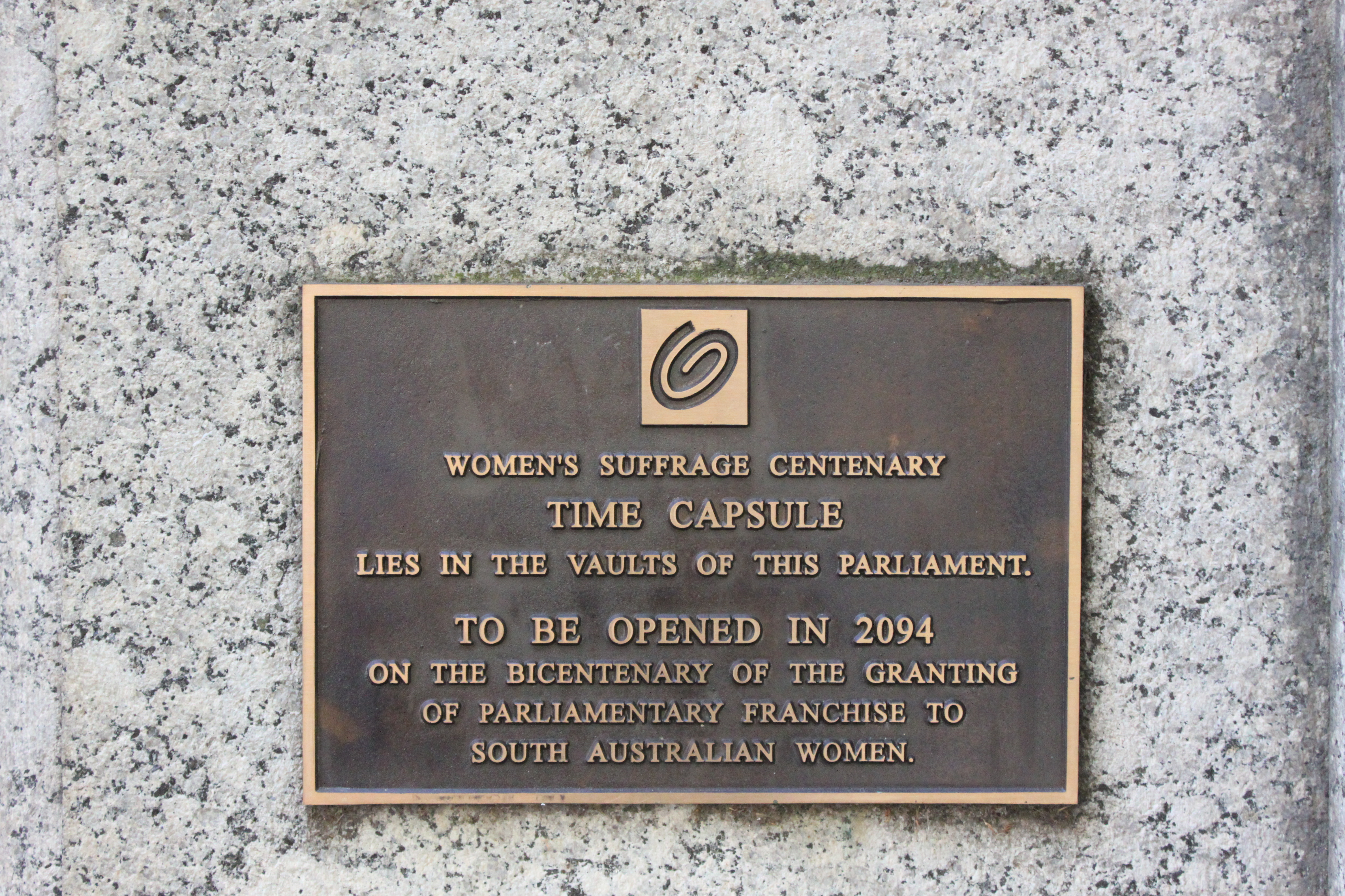 Women's suffrage time capsule at Parliament House, Adelaide.